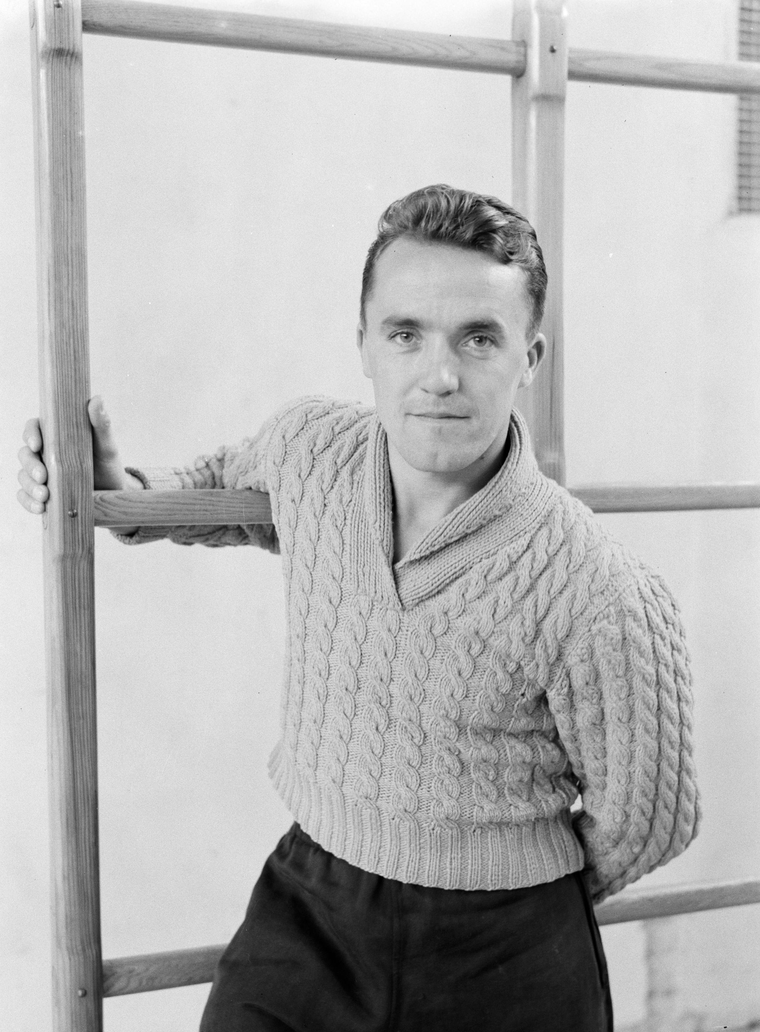 Collectie / Archief : Fotocollectie Van de Poll Reportage / Serie : Reis naar Polen Beschrijving : Warschau. Centraal Instituut voor Lichamelijke Oefening: portret van de docent en Pools skikampioen Bronistan Czech Datum : 1934 Locatie : Polen, Warschau Trefwoorden : kampioenen, lichamelijke opvoeding, portretten, skiën Persoonsnaam : Czech, Bronistan Fotograaf : Poll, Willem van de Auteursrechthebbende : Nationaal Archief Materiaalsoort : Glasnegatief Nummer archiefinventaris : bekijk toegang 2.24.14.02 Bestanddeelnummer : 190-1339